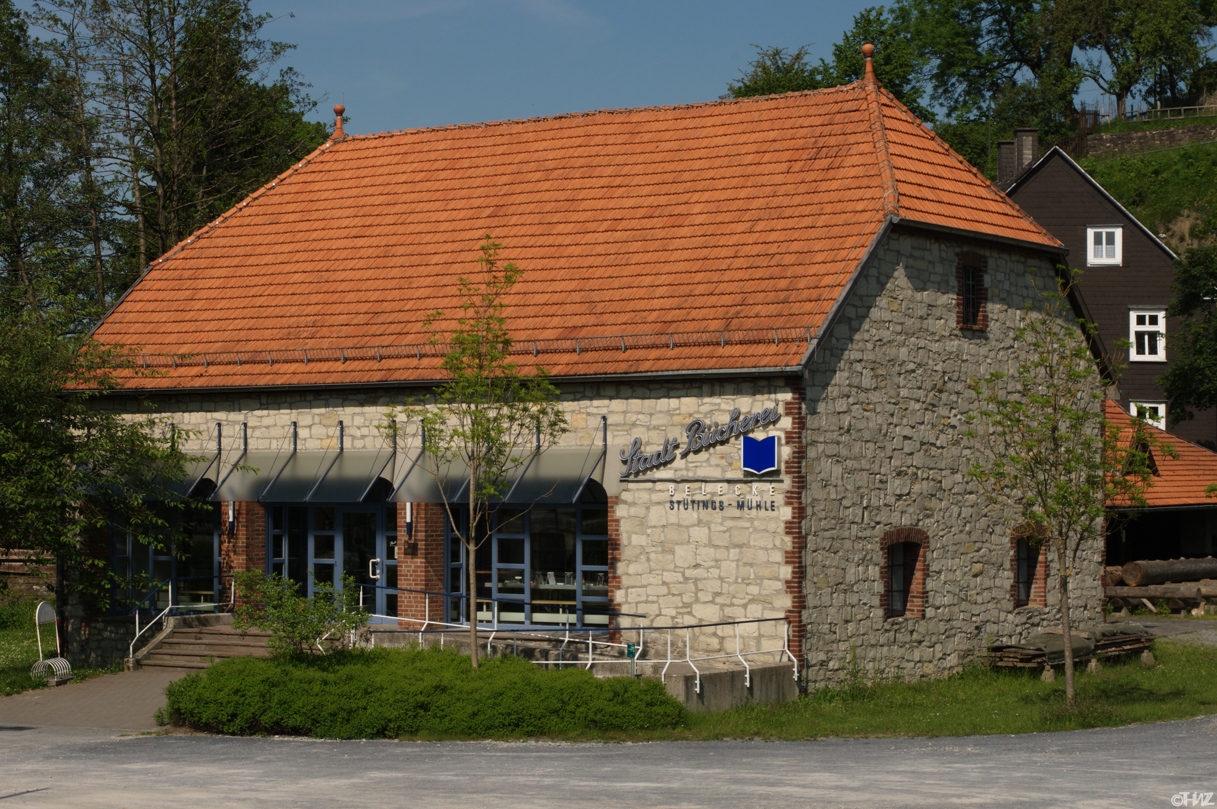 Stütings Mühle: Historische Sägemühle im Warsteiner Ortsteil Belecke; heute als Stadtbücherei benutzt. Die Sägemühle ist vollfunktionstüchtig und wird zu Demonstrationszwecken betrieben.